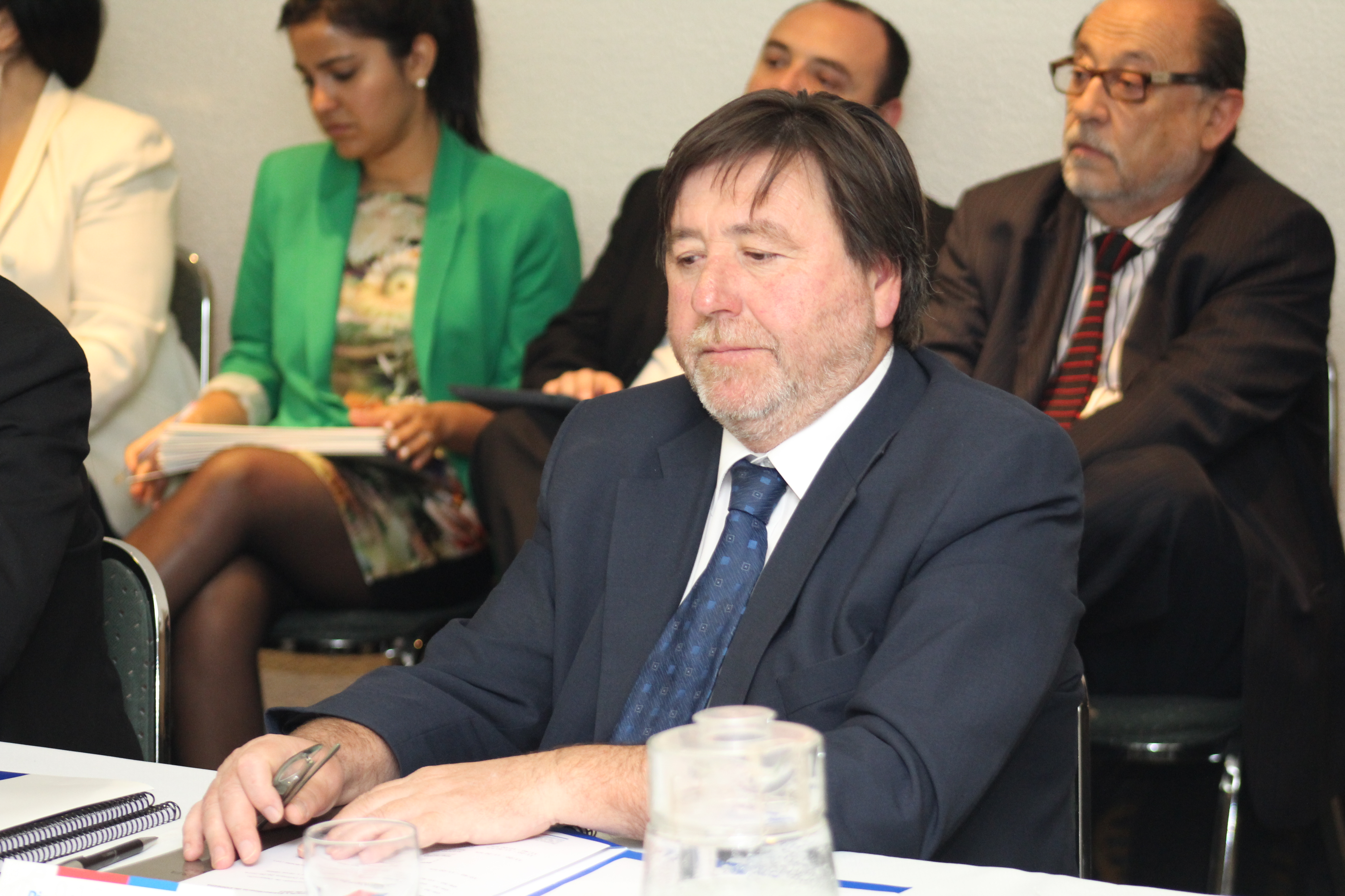 Subsecretario de Desarrollo Regional, Ricardo Cifuentes